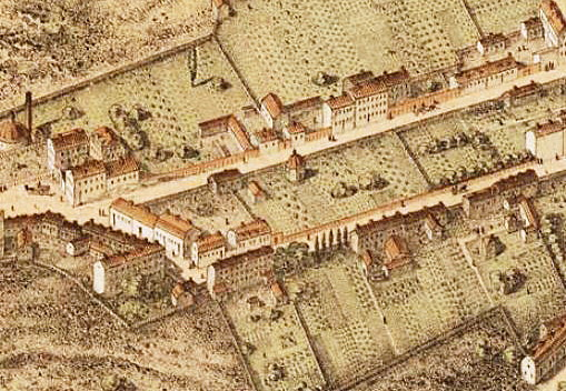 Wirwachs malmgård (längst till vänster), Brännkyrkagatan, Hornsgatan. Del av Neuhaus stadspanorama över Stockholm.